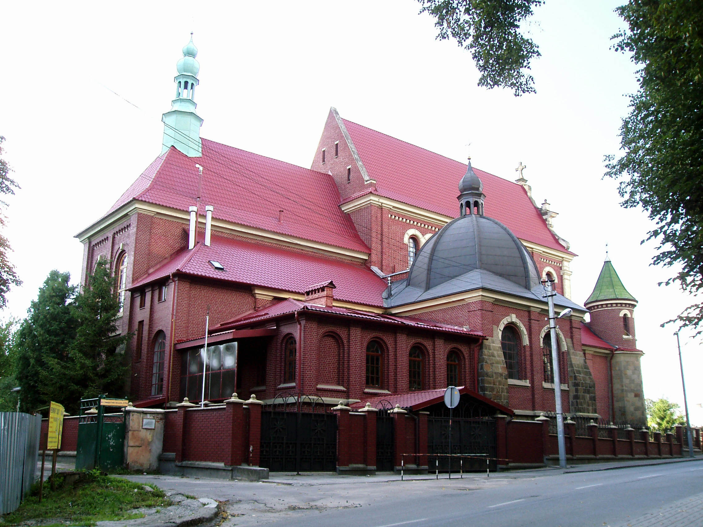 Церква священномученика Йосафата у Львові на вулиці Замарстинівській, 134. Архітектор Ян Кароль Зубжицький.